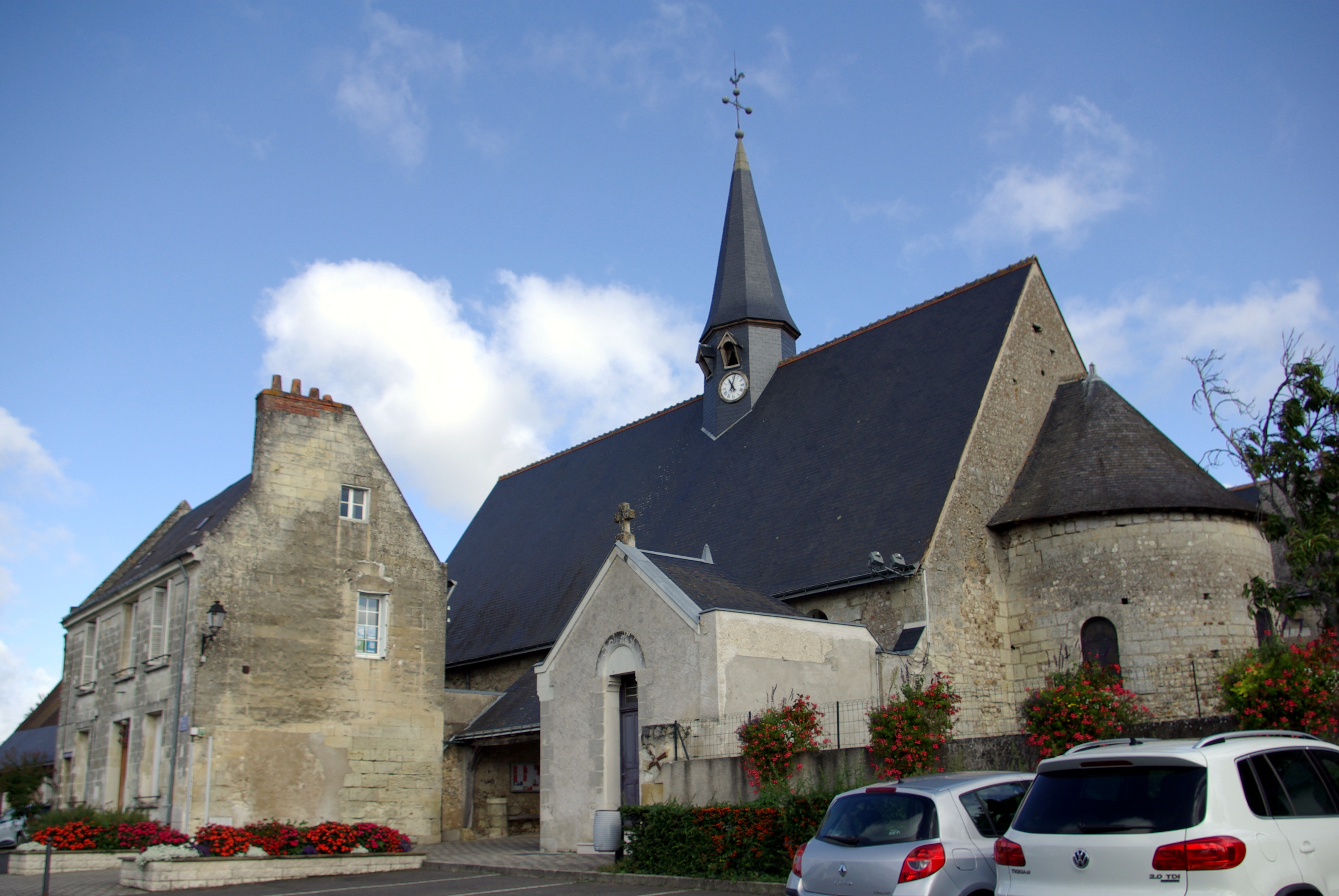 Église Saint-Pierre de Parçay-Meslay. This building is en partie classé, en partie inscrit au titre des Monuments Historiques. .